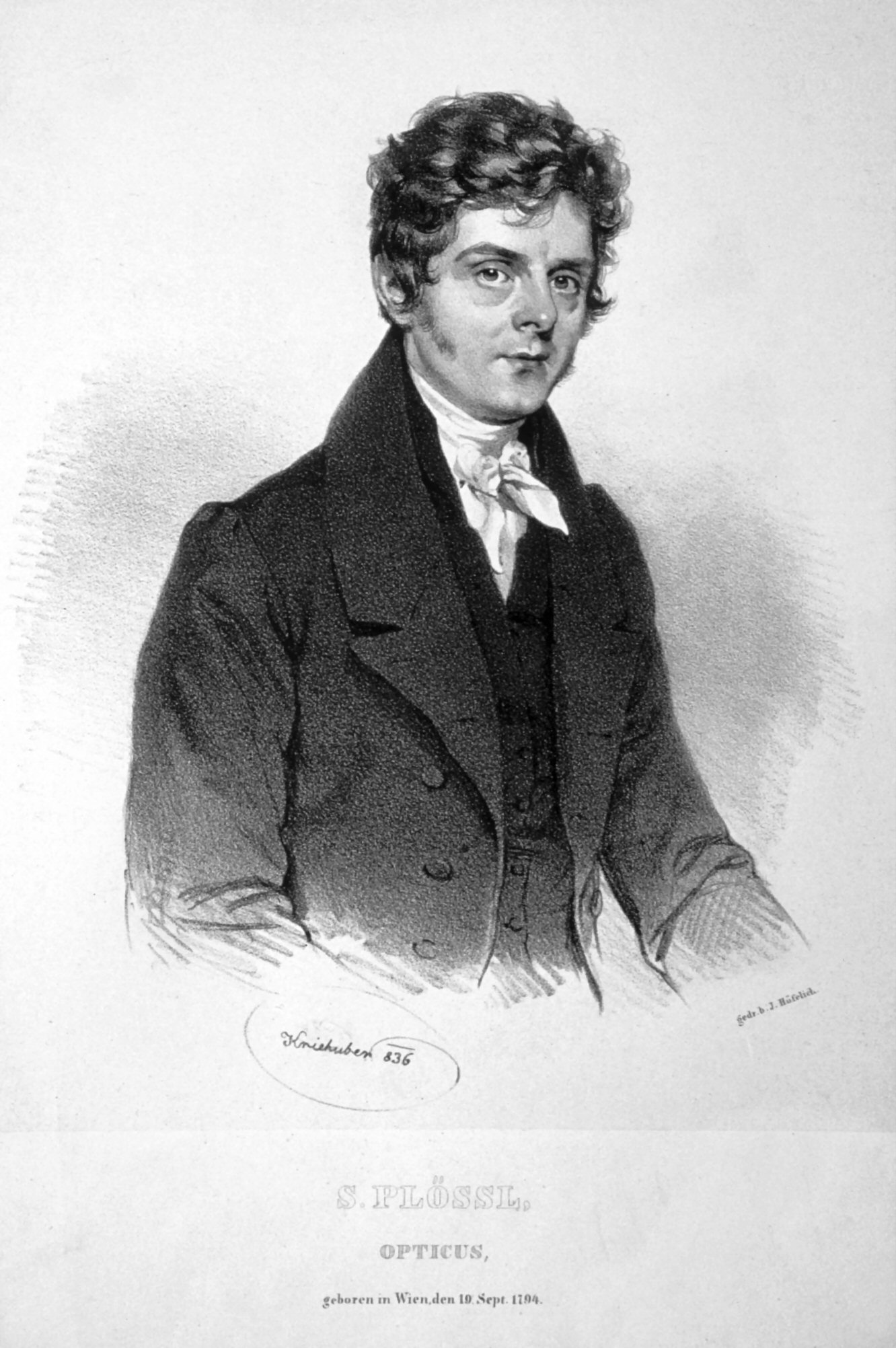 Simon Plössl (1794-1868), österreichischer Optiker Lithographie von Josef Kriehuber, 1836